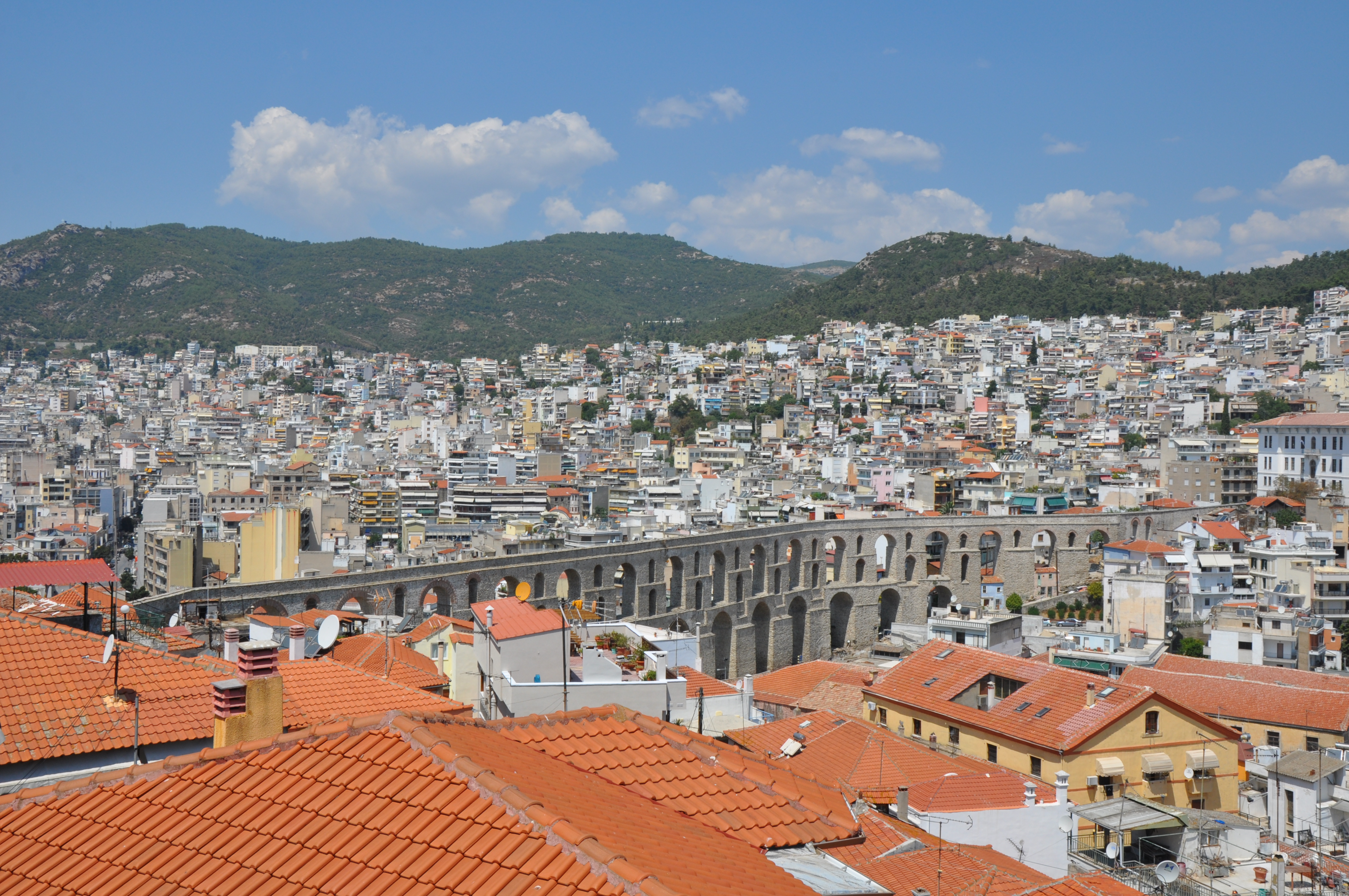 Μεσαιωνικό υδραγωγείο Καμάρες«Μεσαιωνικό υδραγωγείο Καμάρες»